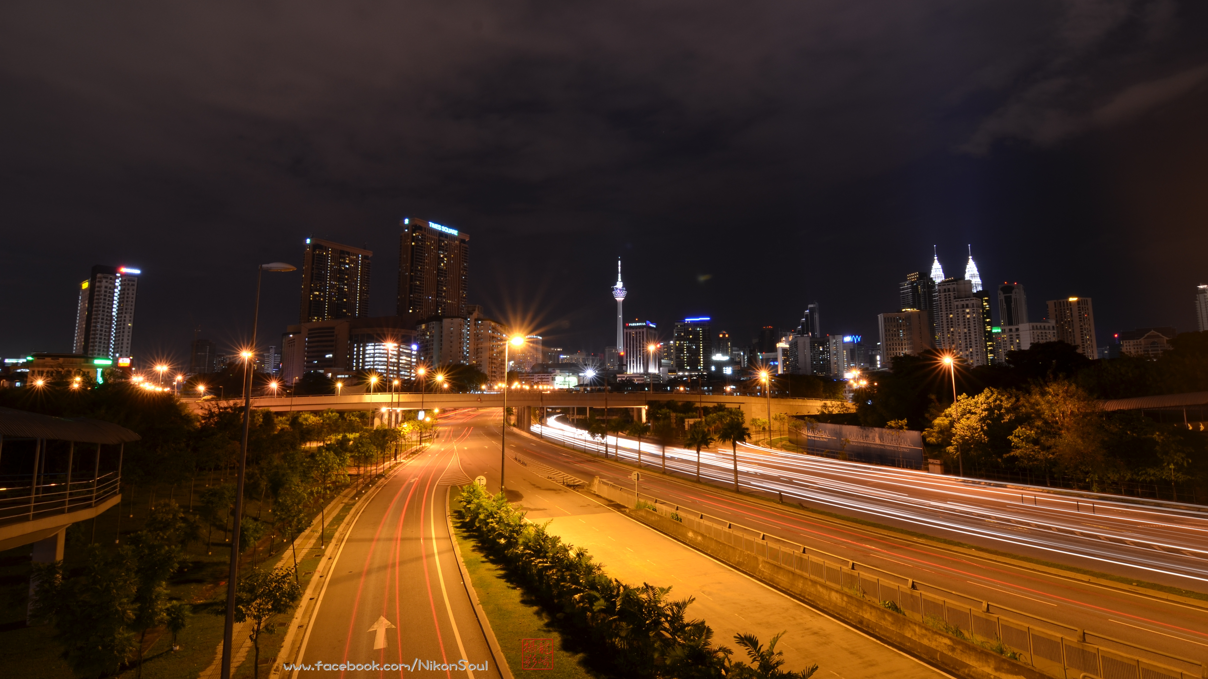 Jalan Kampung Pandan